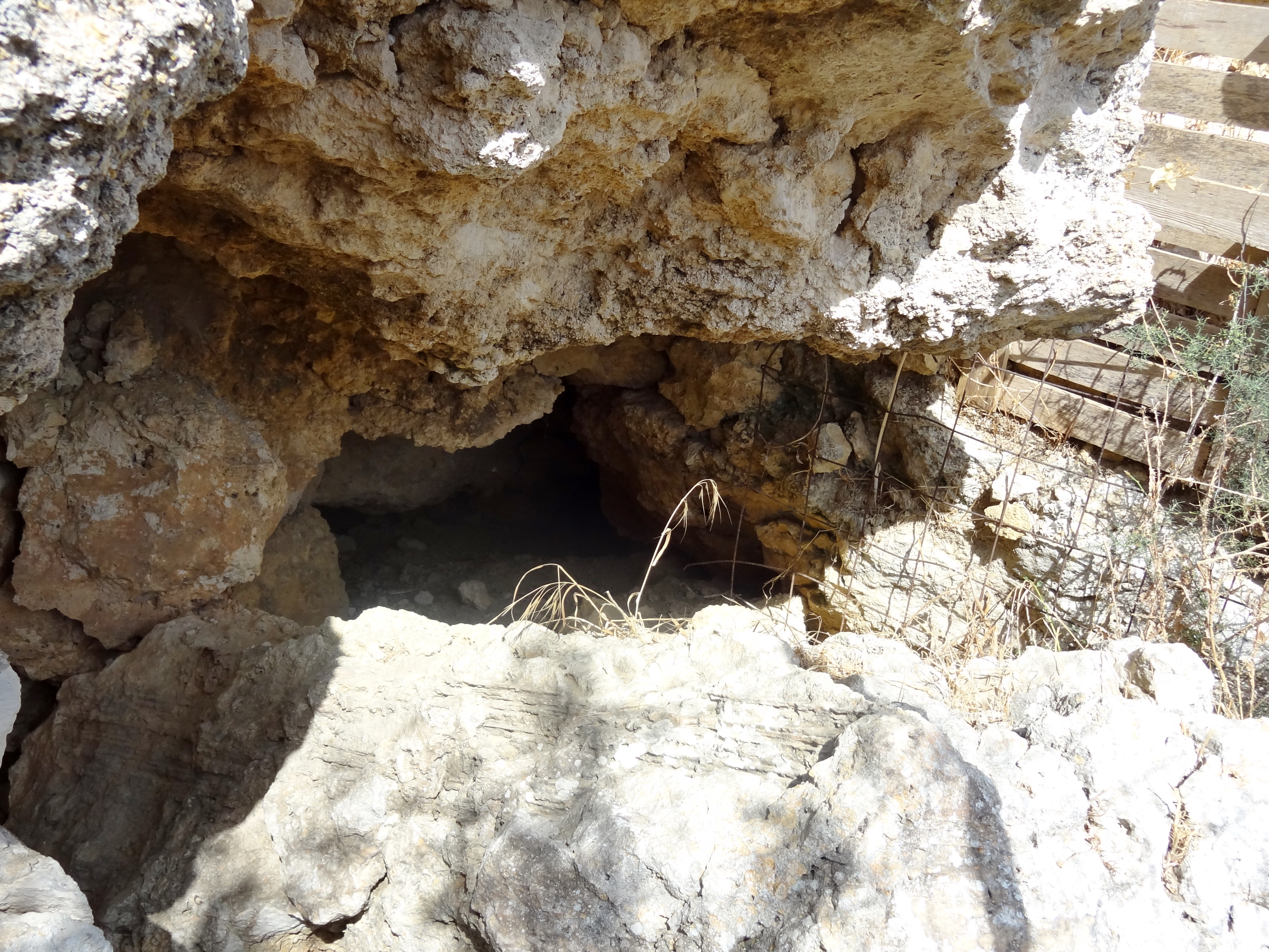 Westseite des Profitis Ilias mit dem Eingang zur nicht begehbaren Höhle von Arkalochori, Regionalbezirk Iraklio, Kreta, Griechenland